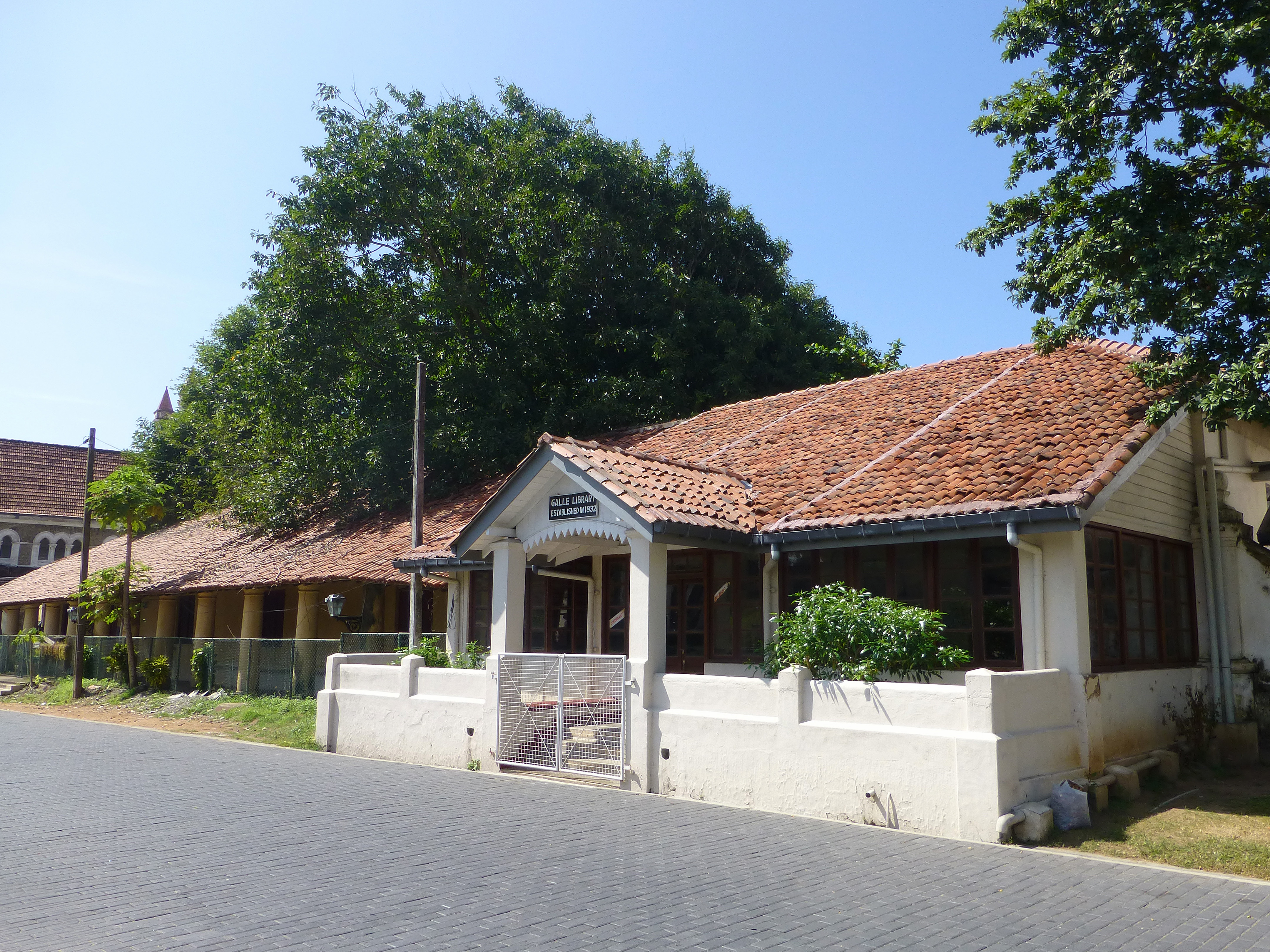 Bibliothèque de Galle (Sri Lanka), fondée en 1832